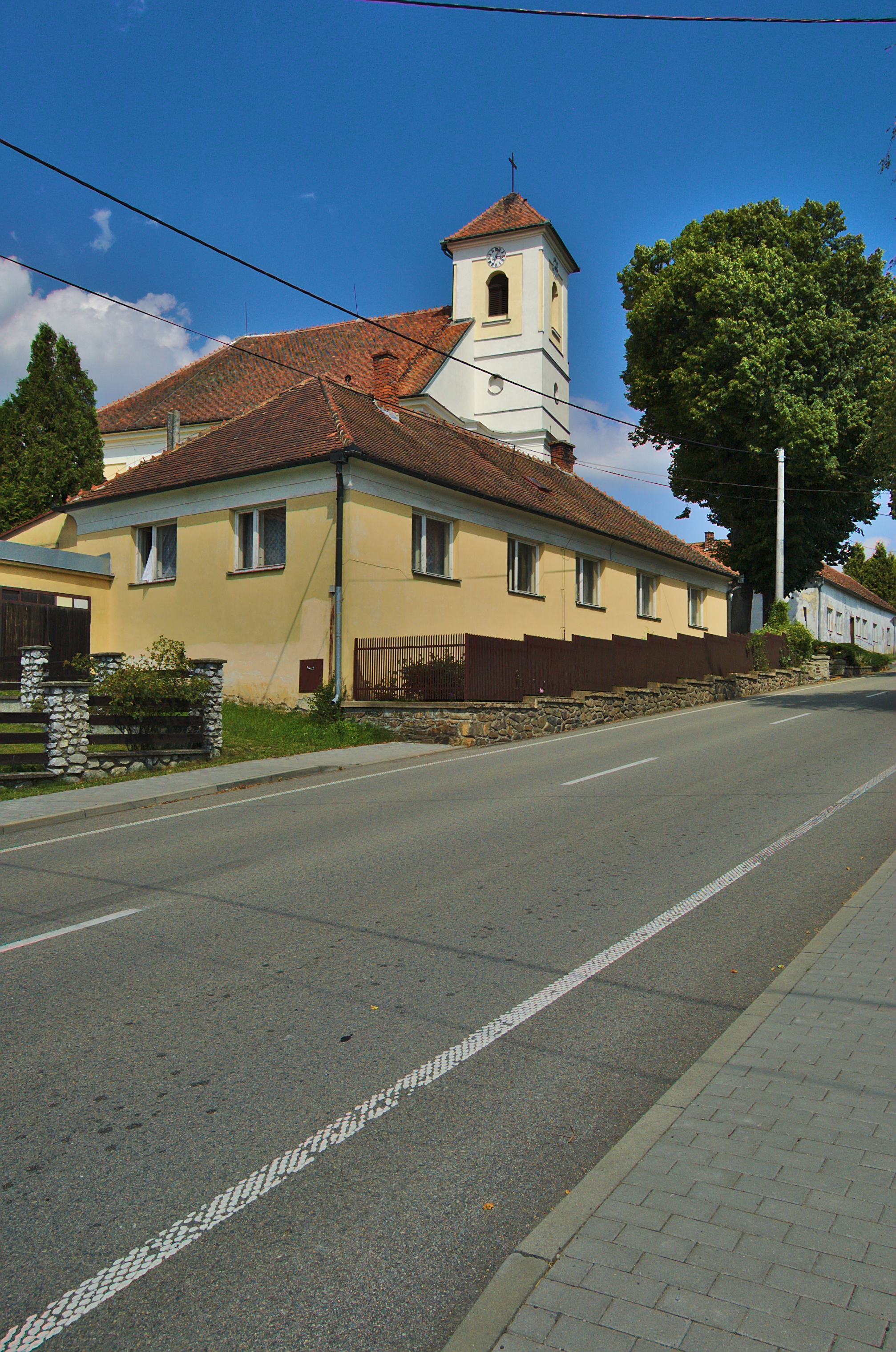 Kostel svatého Bartoloměje, Žďárná, okres Blansko